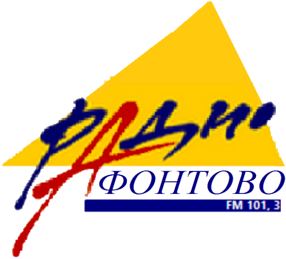 Логотип красноярской радиостанции «Радио Афонтово»